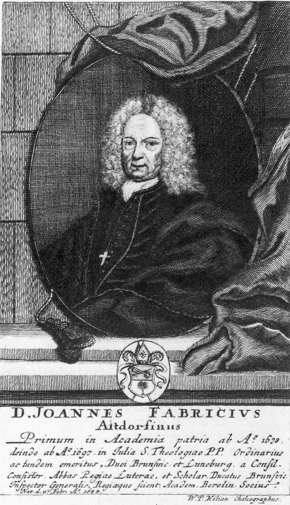 Johann Fabricius (1644–1729), Professor an der Universität Helmstedt.